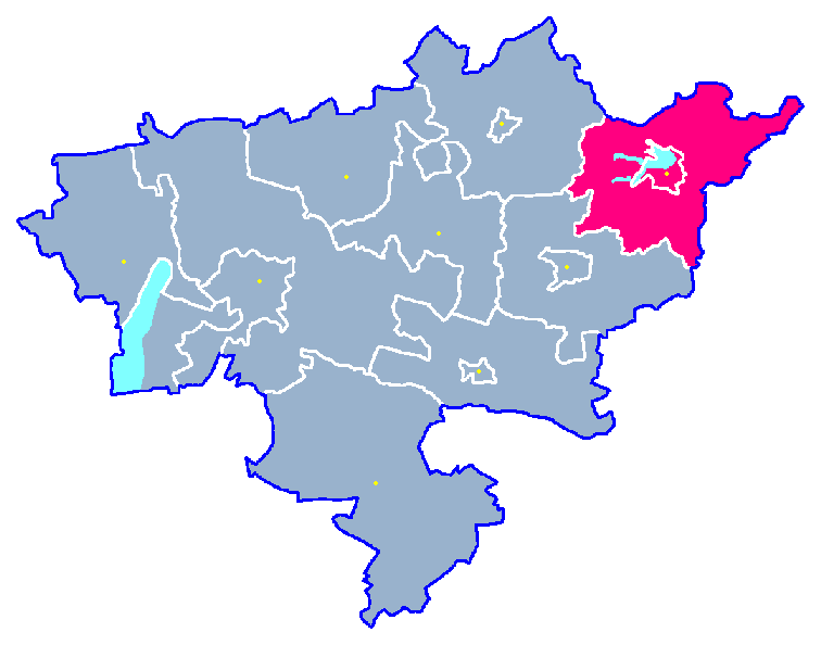 Locator maps for communes in województwo zachodniopomorskie : Ińsko gm.png (podział na gminy)